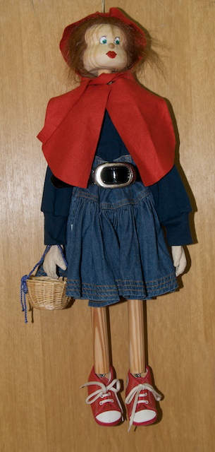 Eng Routkäppchemarionett; e Merci un d'Iris Manzoni an hir Marionetten.